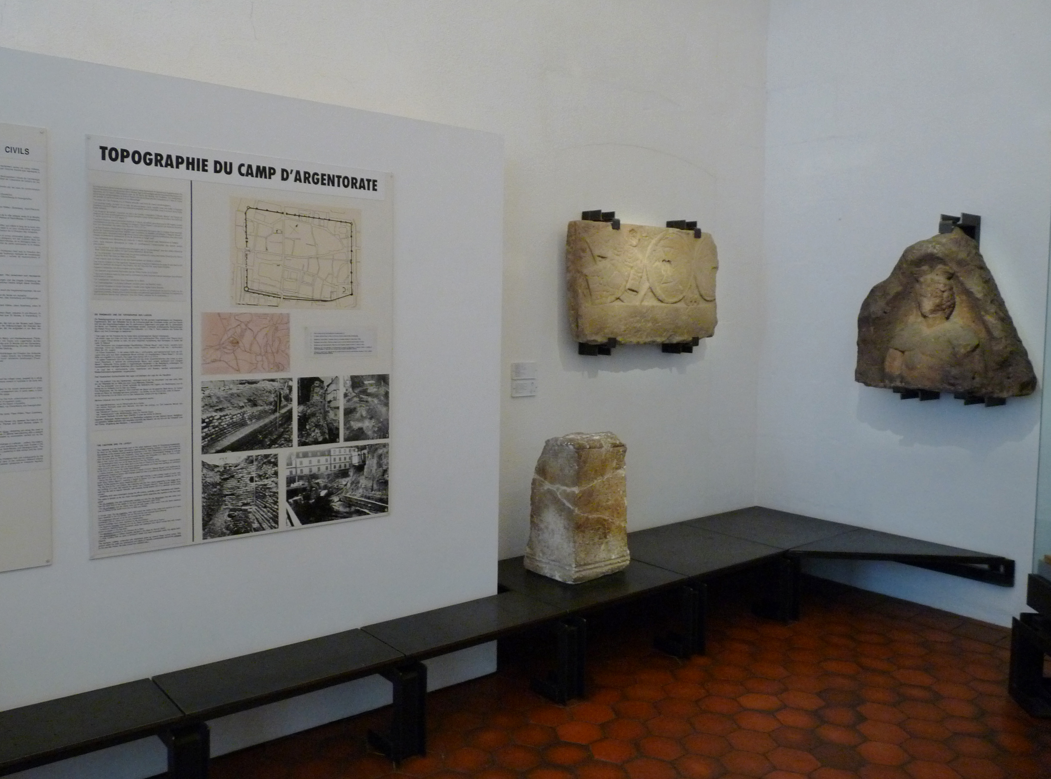 Musée archéologique de Strasbourg : Topographie et vestiges du camp d'Argentorate (Strasbourg)